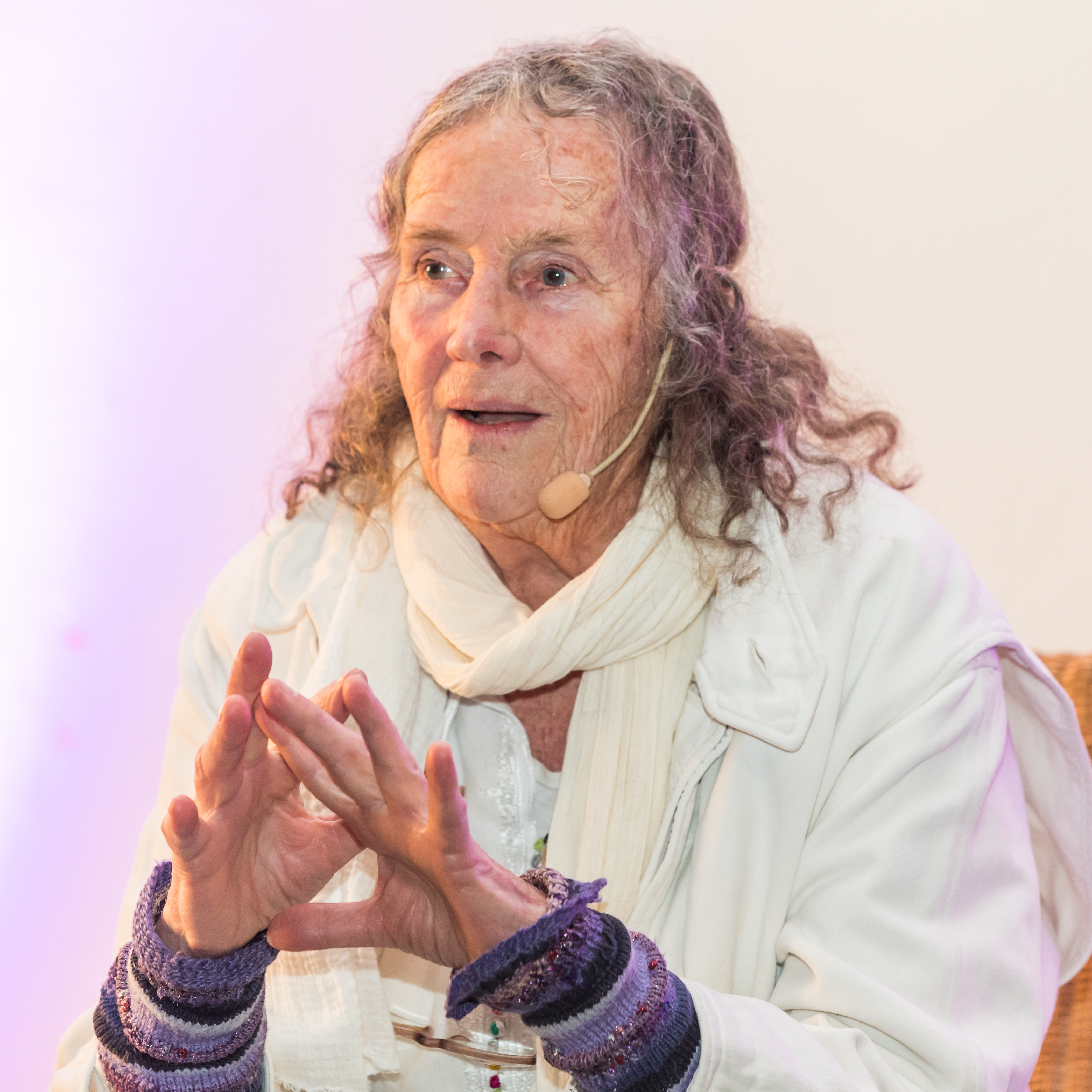 Ein Abend mit der „Mutter“ der Fluxus-Bewegung Mary Bauermeister. Im Rahmen der Sonderausstellung „KÖLN 68! Protest. Pop. Provokation.“ traten Mary Bauermeister und ihr Sohn Simon Stockhausen gemeinsam auf die Bühne. Mit dabei auch der Künstler Gregor Zootzky mit seinem Zeichentrick-Kurzfilm „Psst pp Piano – Hommage à Mary Bauermeister“.